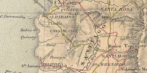 Curacaví, Topografie und Wegenetz vor 1854